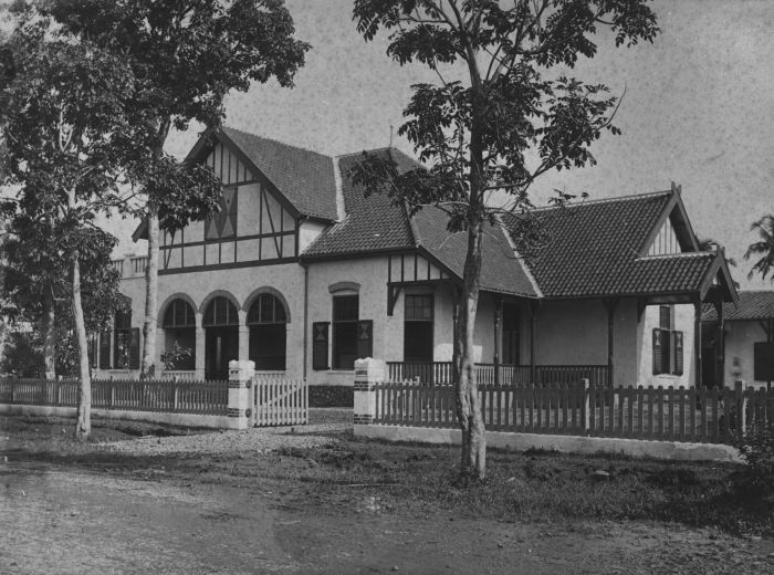 foto. Villa in Bandoeng gebouwd door architectenbureau Biezeveld & Moojen